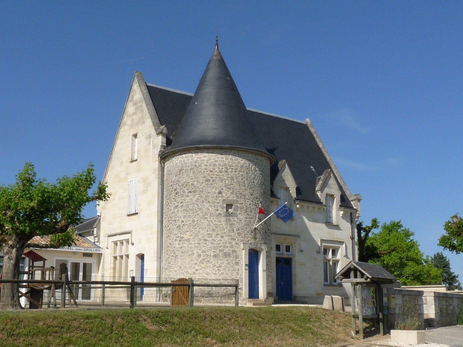 Mairie de Bonzac (ancien moulin à vent), Gironde, France